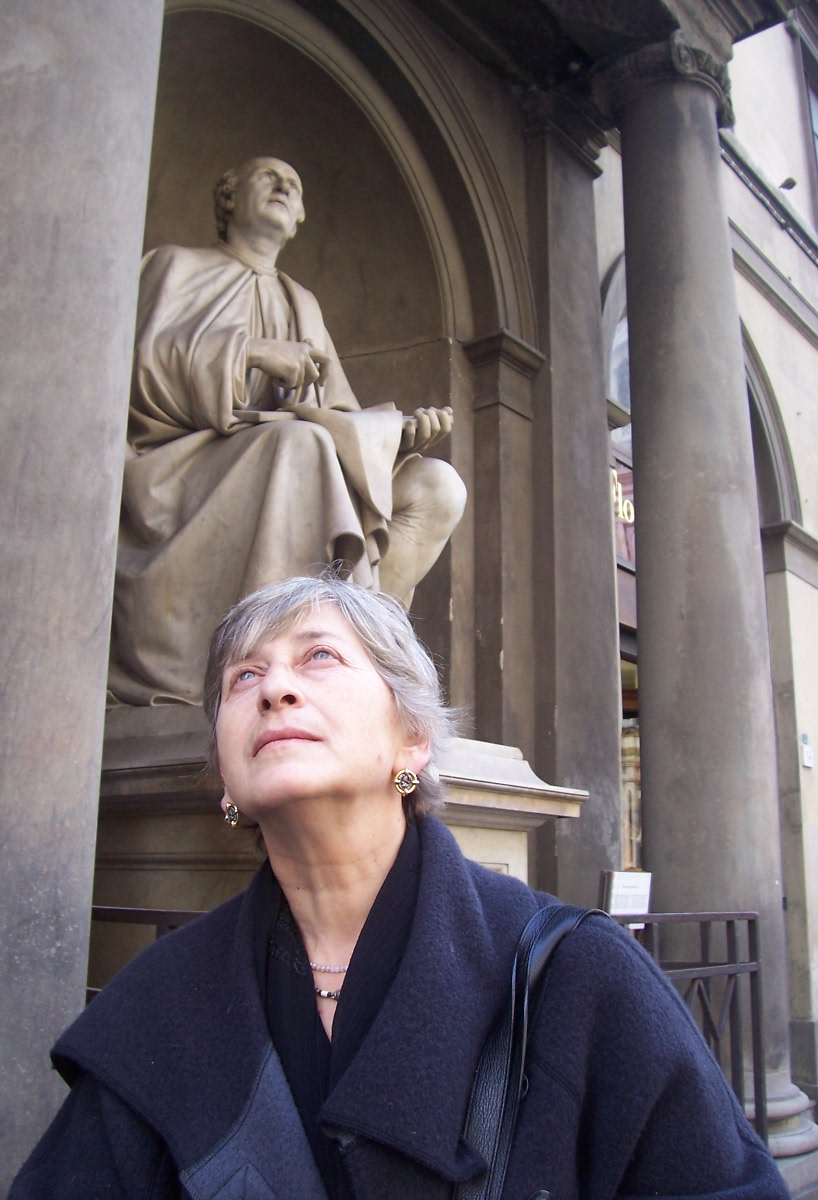 Foto di Olga Sedakova Author fch_uniss a Firenze 2008-11-17